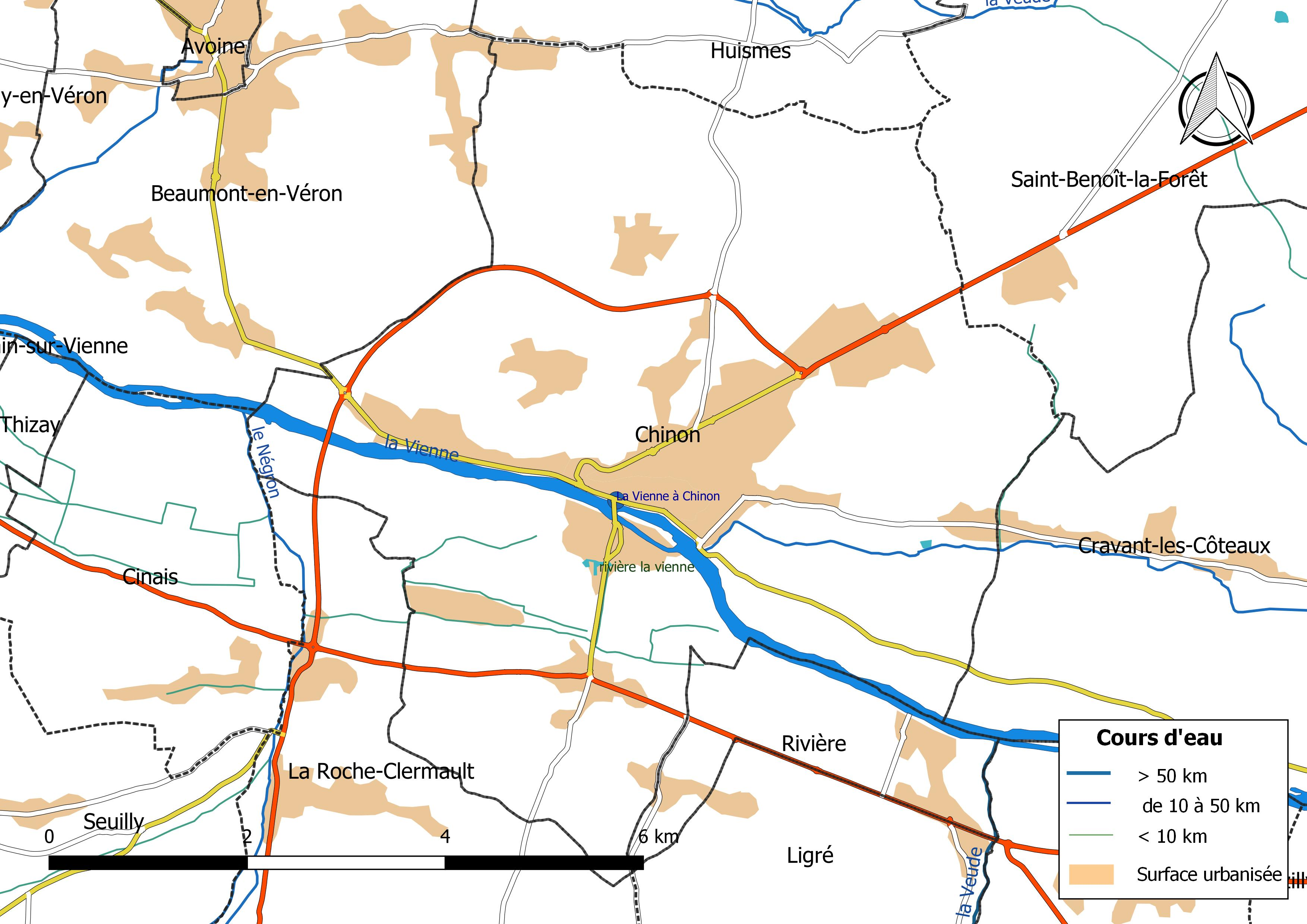 Carte du réseau hydrographique de la commune de Chinon (France).